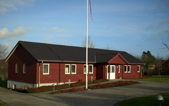 Sønder Brarup Danske Kirke